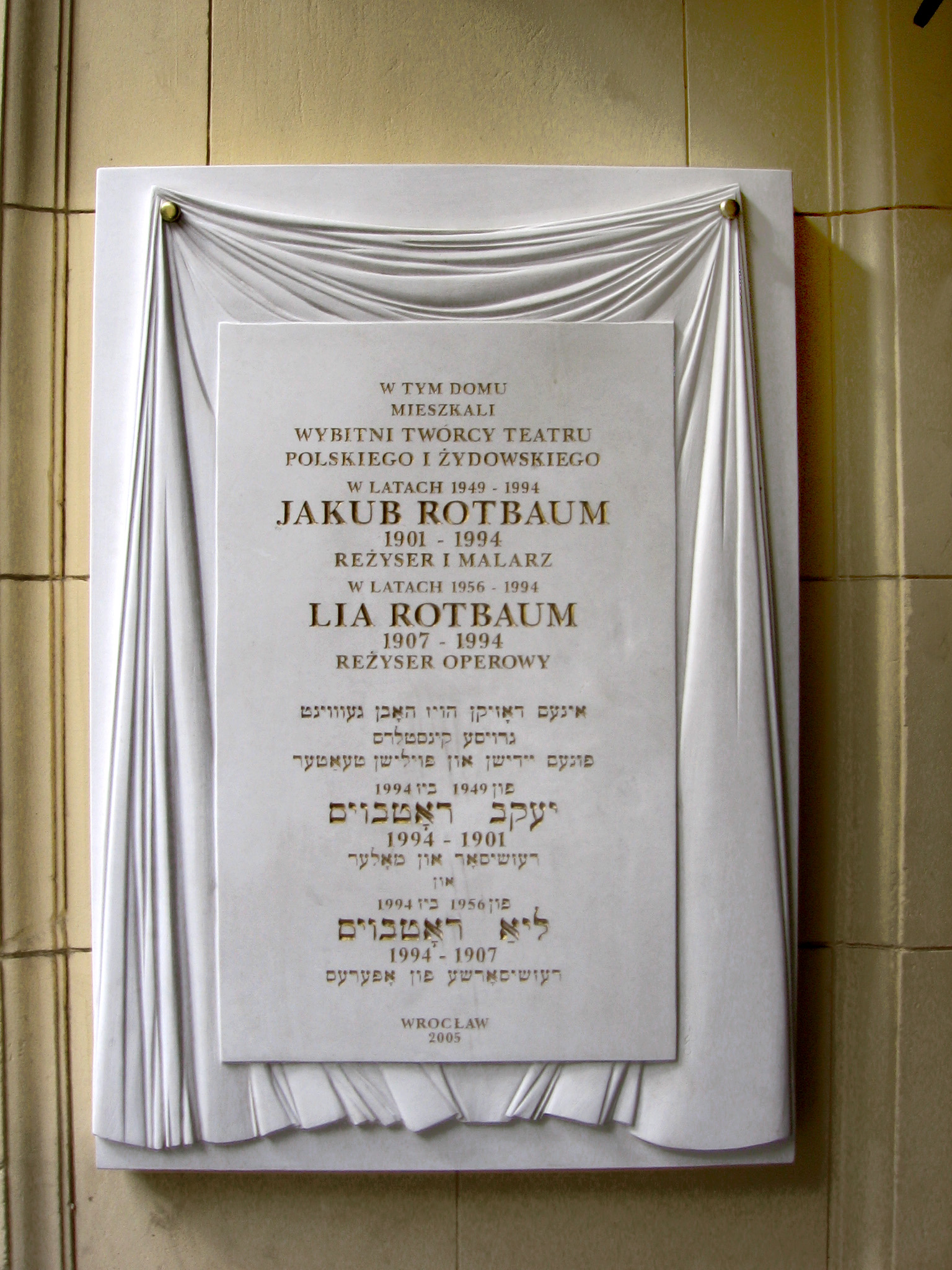 tablica pamiątkowa przy drzwiach wejściowych do kamienicy nr 5 przy ulicy Włodkowica we Wrocławiu